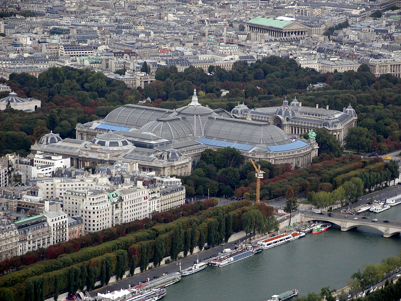 Vue depuis la Tour Eiffel, le Grand Palais, Paris, (France).